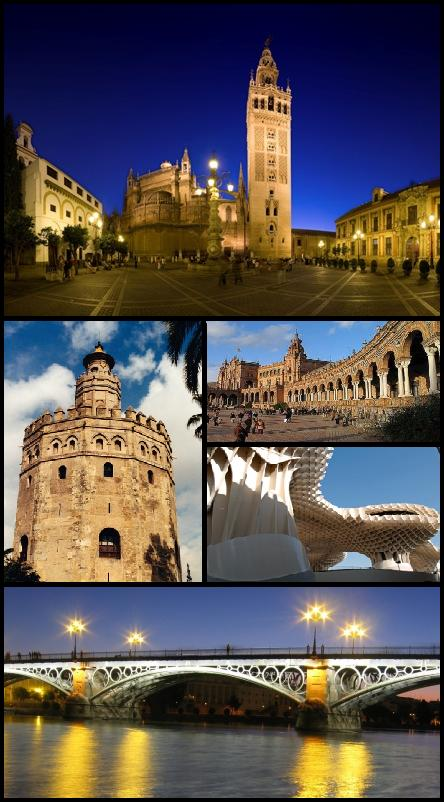 Recopilación de fotos de los principales monumentos de la ciudad de Sevilla.